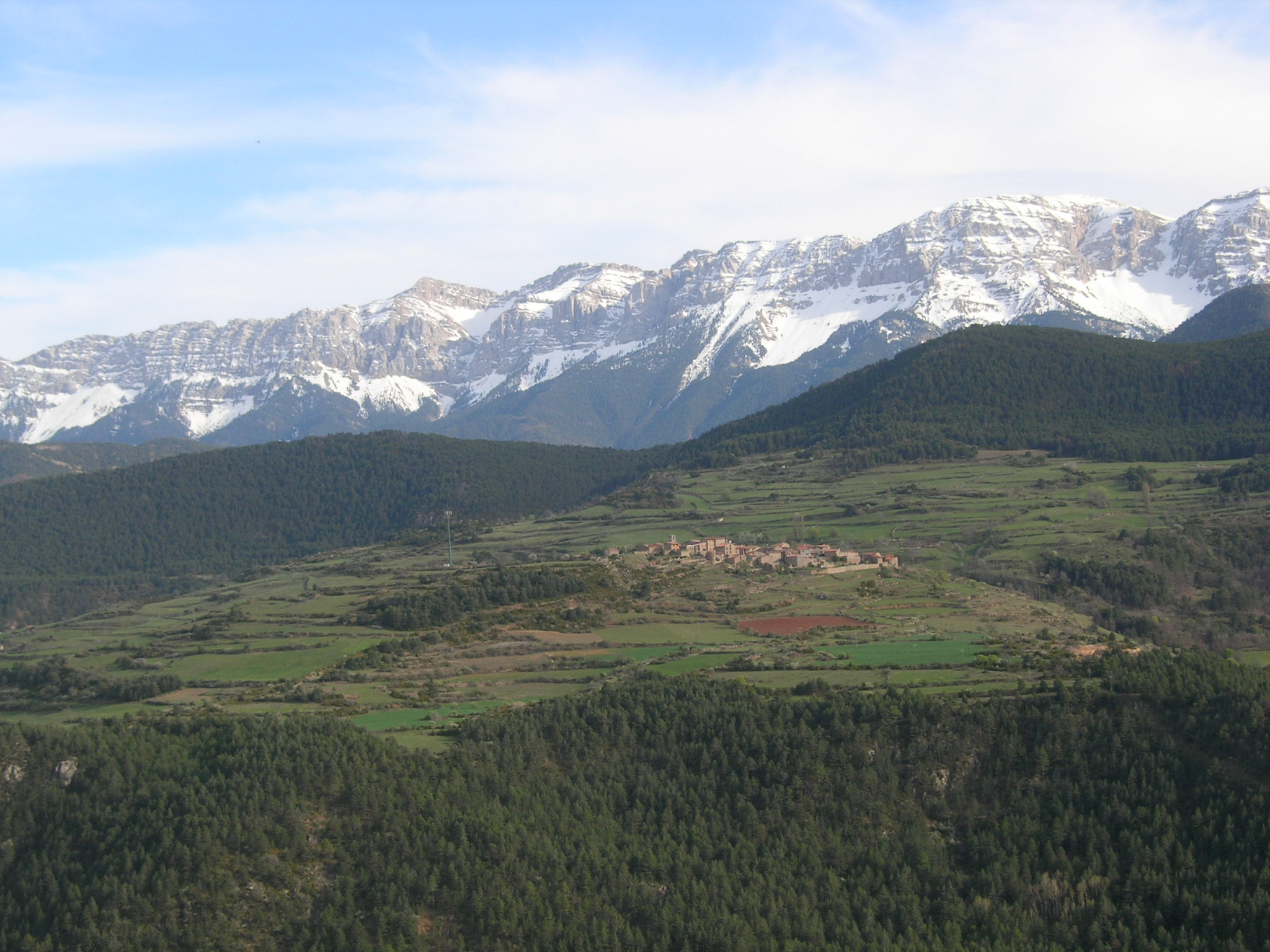 Serres del Cadí-el Moixeró This is a a photo of a natural area in Catalonia, Spain, with id: ES510202